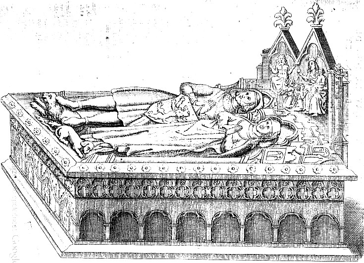 Tombeau de Henri III, duc de Brabant, et d'Adélaďde de Bourgogne, son épouse en l'église des Domicains - Louvain